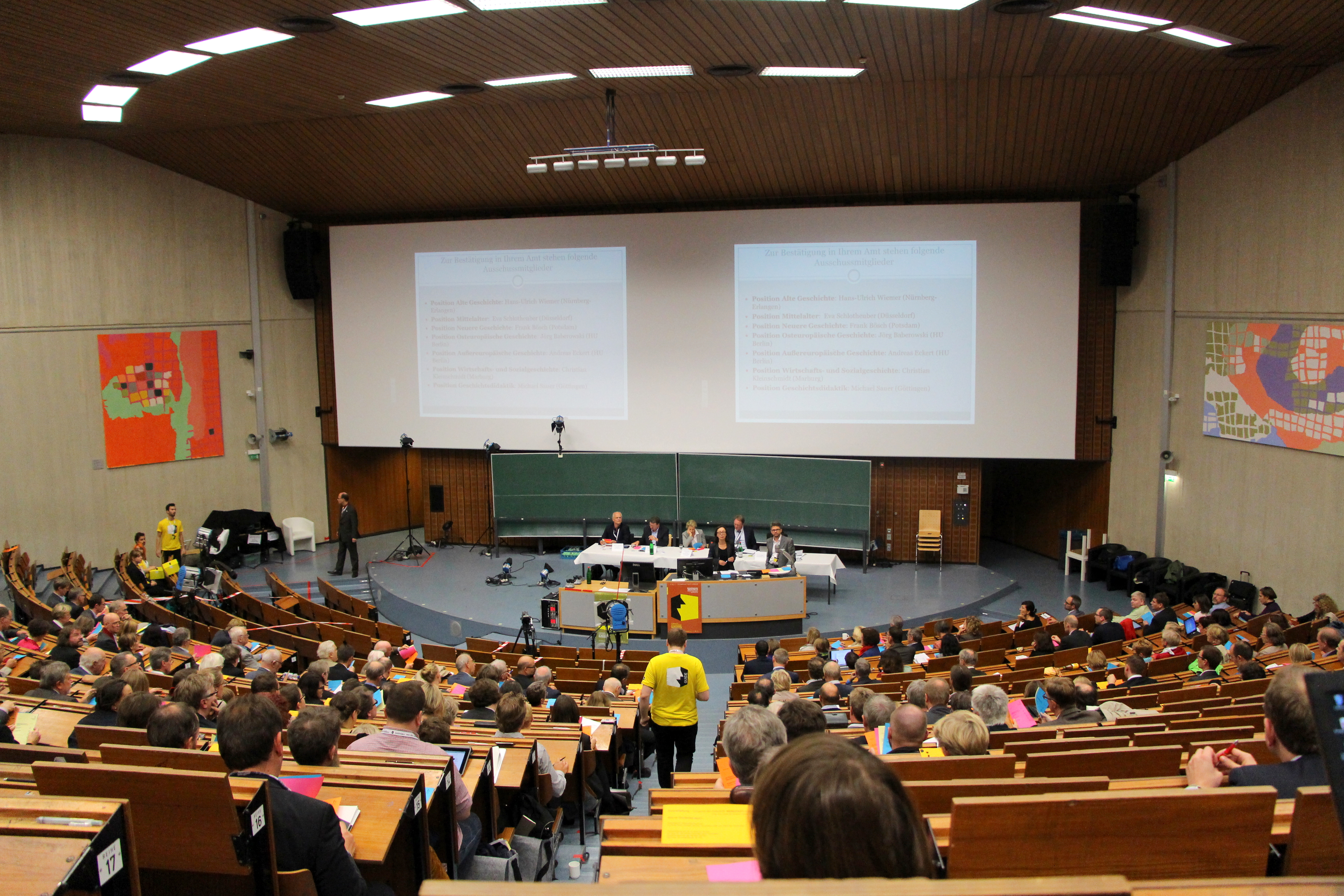 Historikertag 2014 in Göttingen.